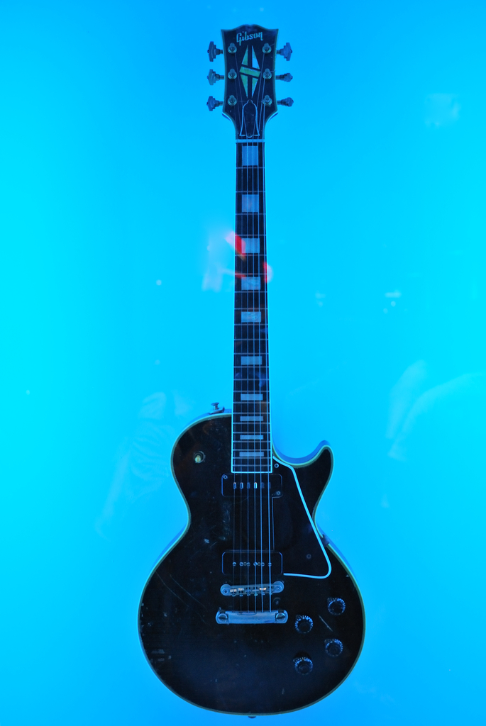 Hendrix's guitar @ blues bar, Chicago CámaraNikon D60 Exposición0,033 sec (1/30) Aperturef/4.2 Lente28 mm Lente28.3 mm Velocidad ISO720 Tendencia de exposición0 EV FlashOff, Did not fire